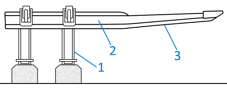 Концевой отвод контактного рельса. 1 — кронштейн крепления контактного рельса; 2 — контактный рельс; 3 — уклон рабочей поверхности.